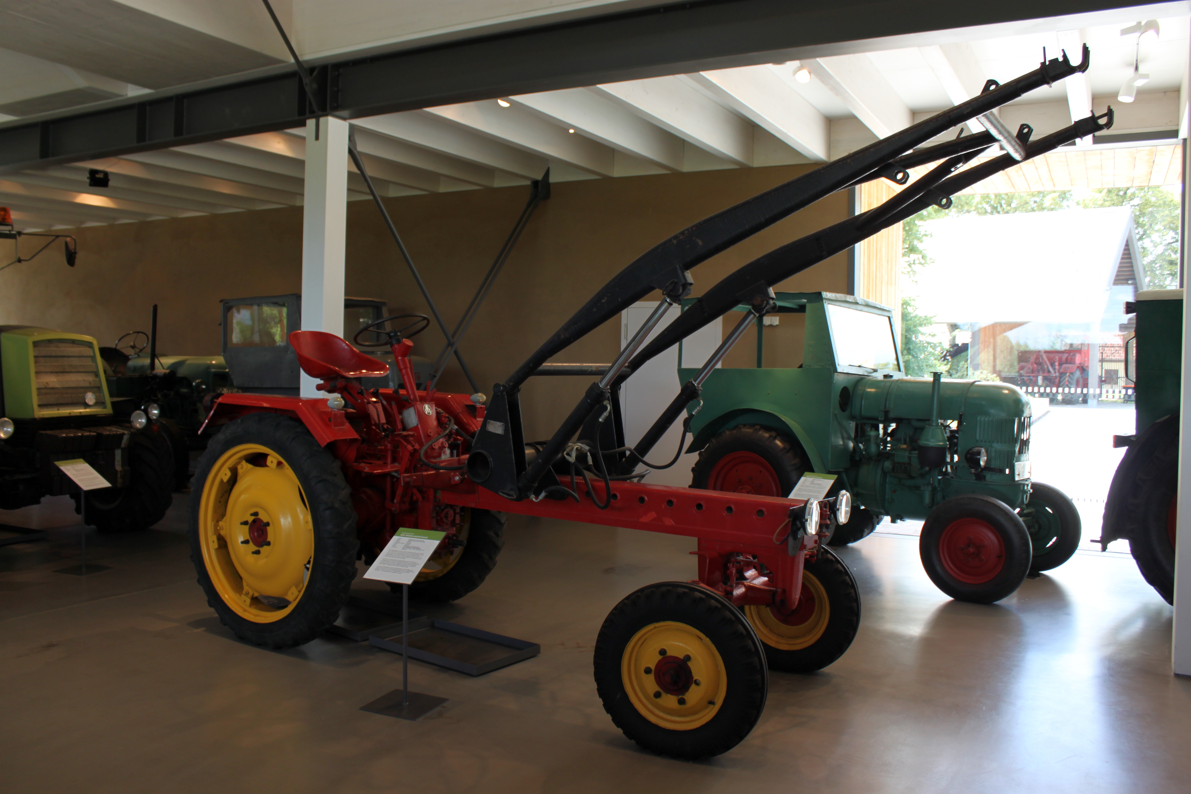 Geräteträger RS 09; Baujahr 1960 (Bauzeit der Serie 1957-1962); Hersteller: VEB Schlepperwerk Schönebeck; 16,5 PS; Hubraum 1.145 cbm; Höchstgeschwindigkeit 15,5 km/h; Gewicht 1.810 kg; Zweizylinder-Viertakt-Dieselmotor; Höhe 1,80m; Breite 1,50m; Länge 5,00m mit Hubarmen. Mit über 30 verschiedenen Anbaugeräten war der RS 09 ausgesprochen flexibel einsetzbar. Sowohl Spurweite als auch Radstand konnten verändert werden. (Agrarmuseum Wandlitz, Brandenburg)